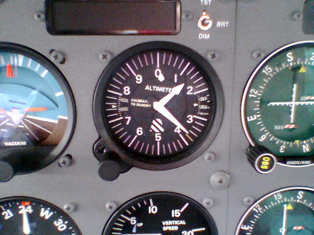 Altimeter in a Cessna 172